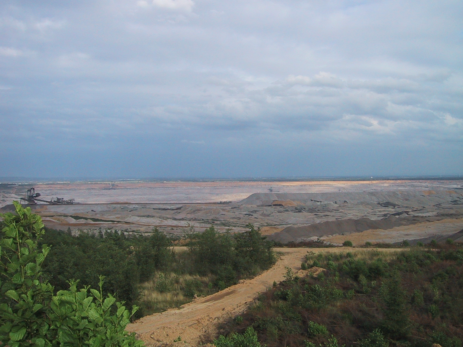 Tagebau Hambach von der Sophienhöhe aus